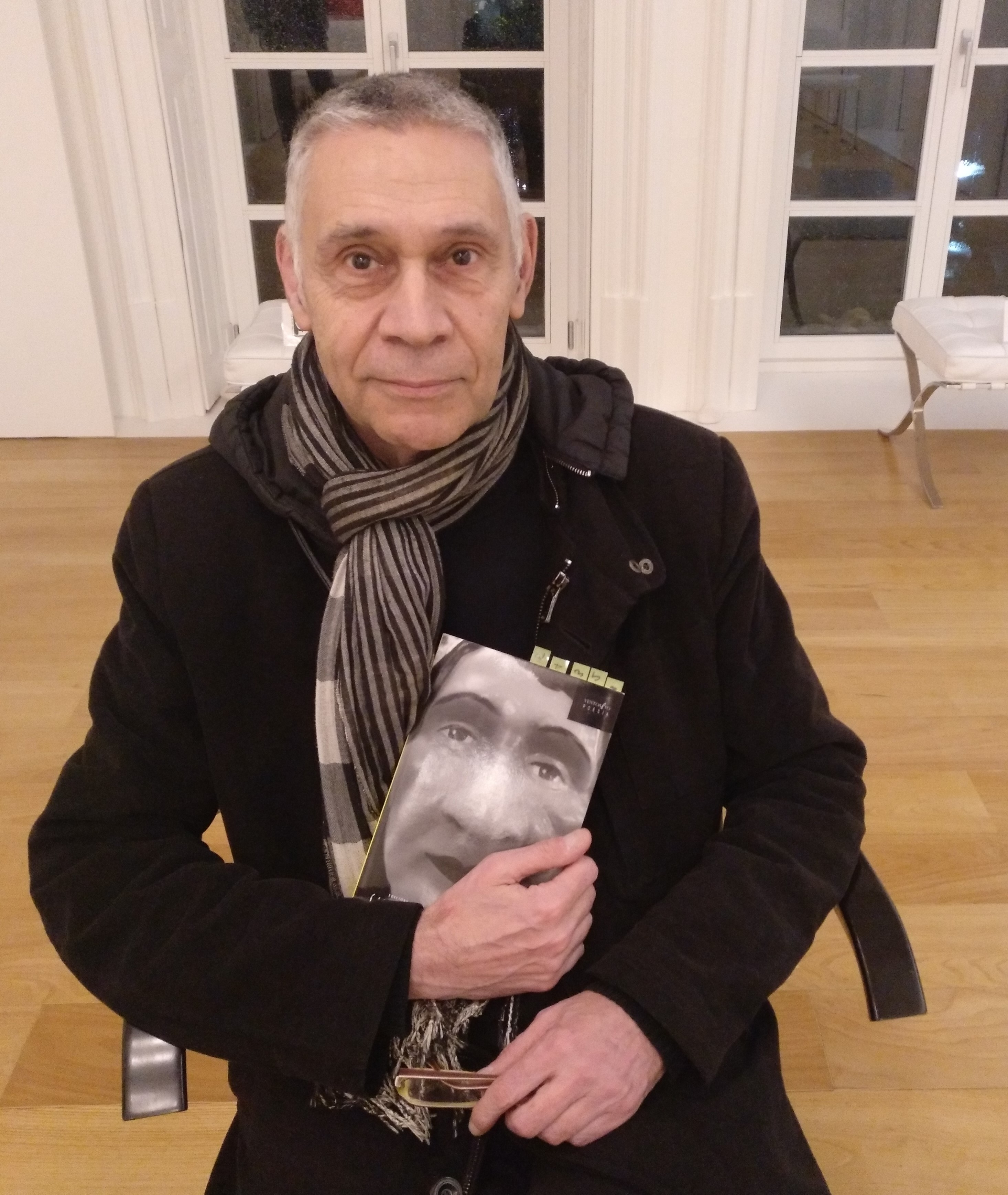 Vítor Vaqueiro, escritor, profesor e fotógrafo galego, na presentación de "1968" no Espazo Nemonon de Pontevedra, 05/03/2019